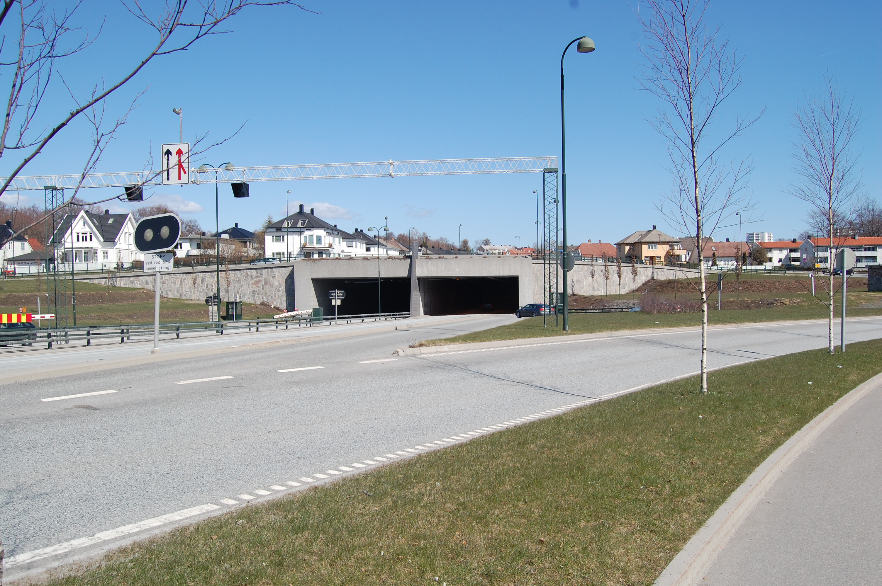 Norsk (bokmål): Oddernestunnelen i Kristiansand, sett fra vest.